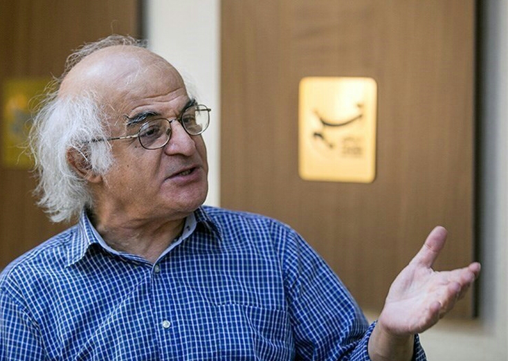 فریدون جیرانی - شهریور ۱۳۹۴